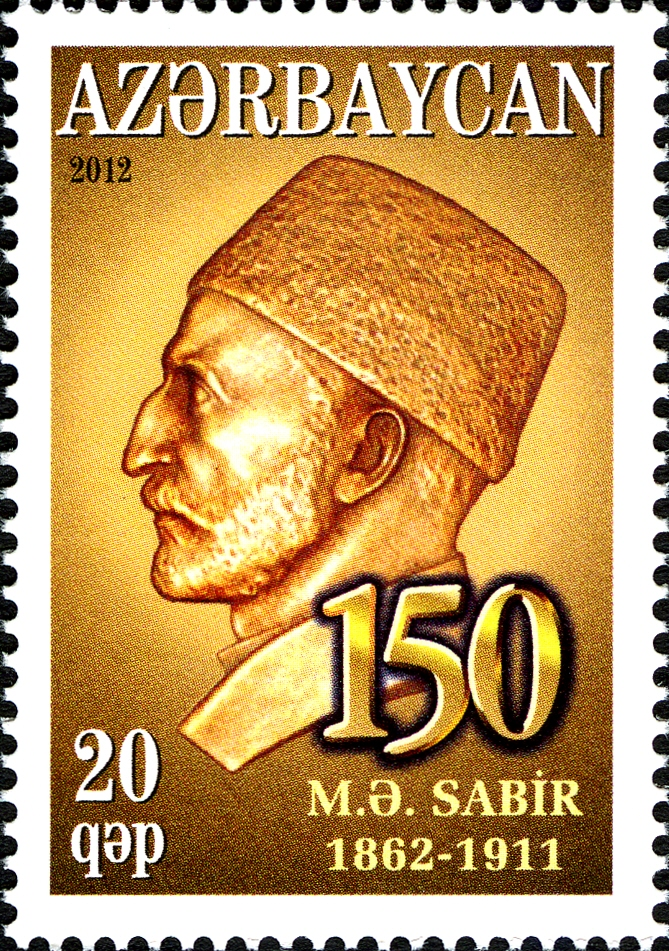 10.07.2012. M.Ə.Sabirin 150 illiyinə həsr olunmuş marka.